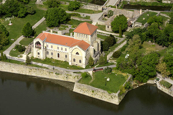 Tatai vár légi fotó